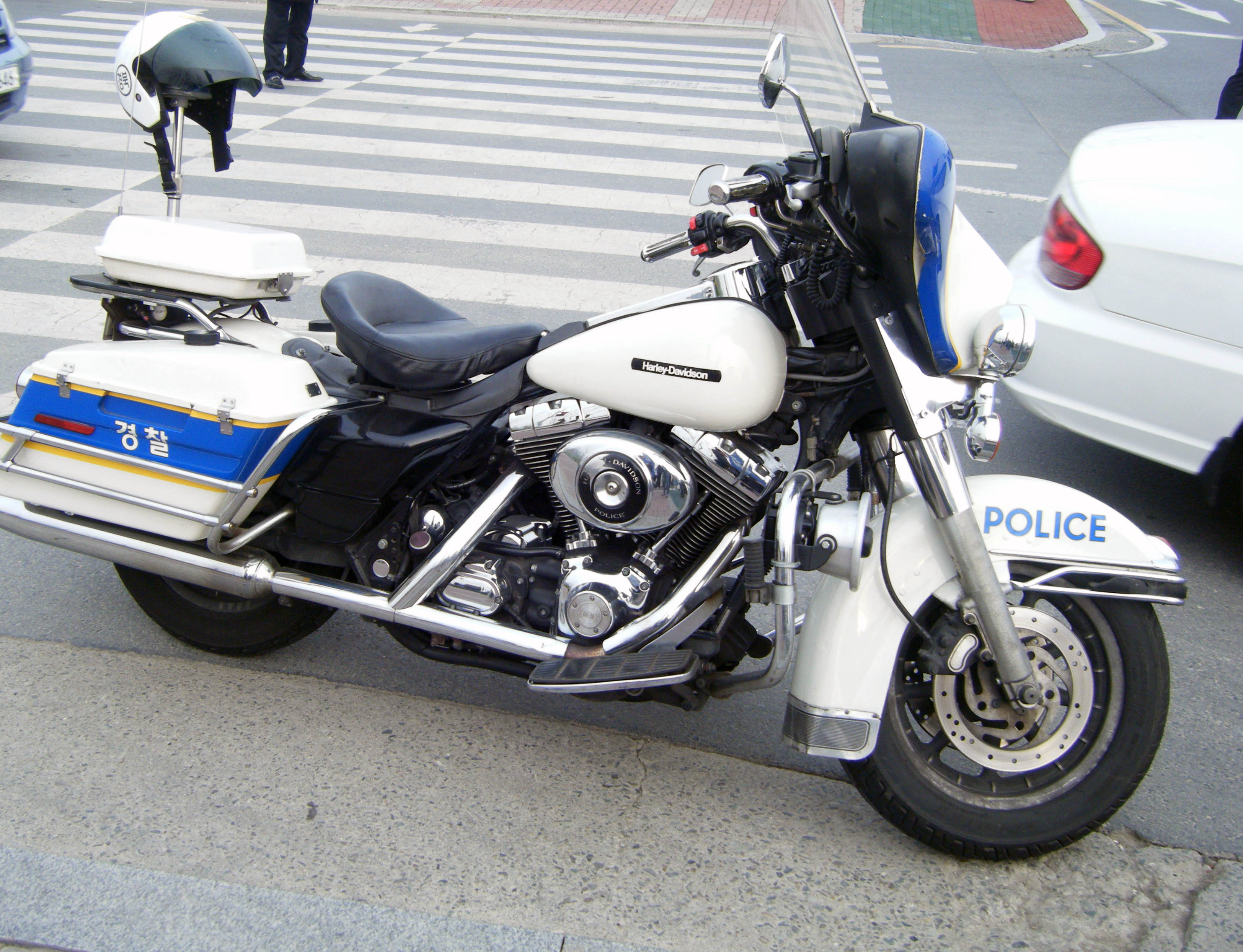 대한민국의 싸이카(줄여서 사이드카)